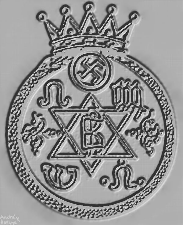 Emblema da Sociedade Teósofica, no século XIX - arte sobre desenho.